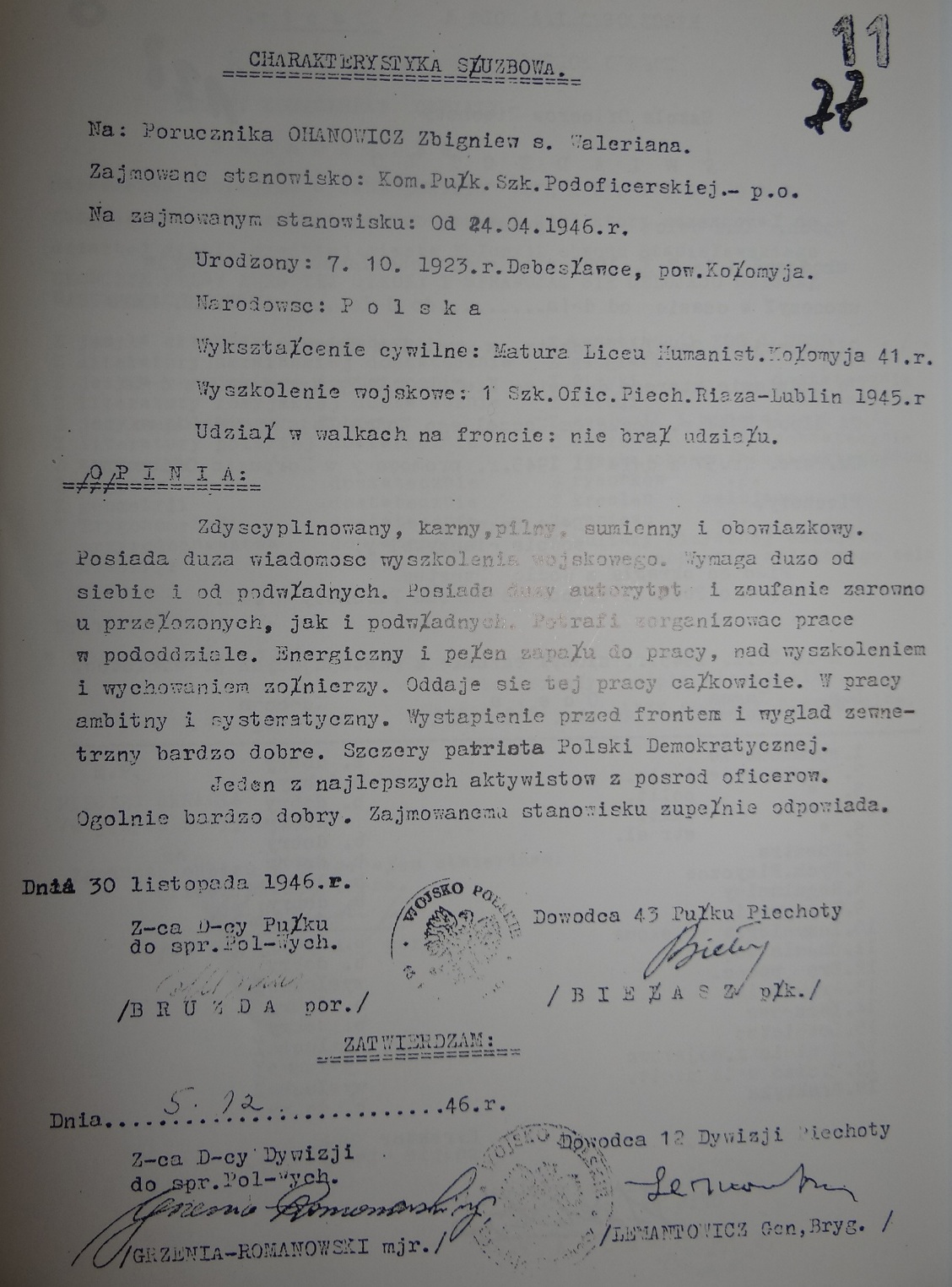 Opinia służbowa oficera 43 pp wystawiona przez dowódcę 43 pp płk Biełasza z dnia 30 listopada 1946r.